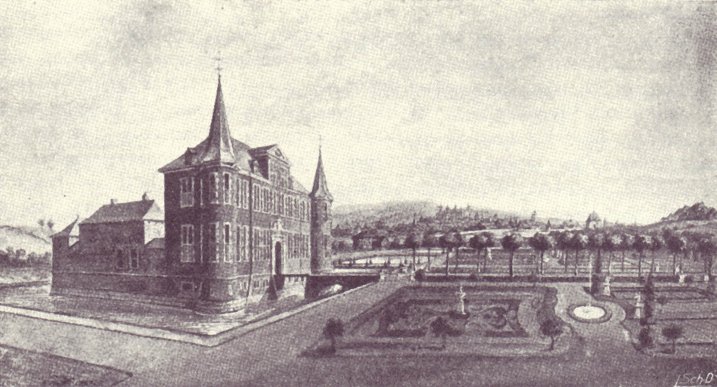 Das Gut Bodenhof in Aachen auf einer aquarellierten Bleistiftzeichnung